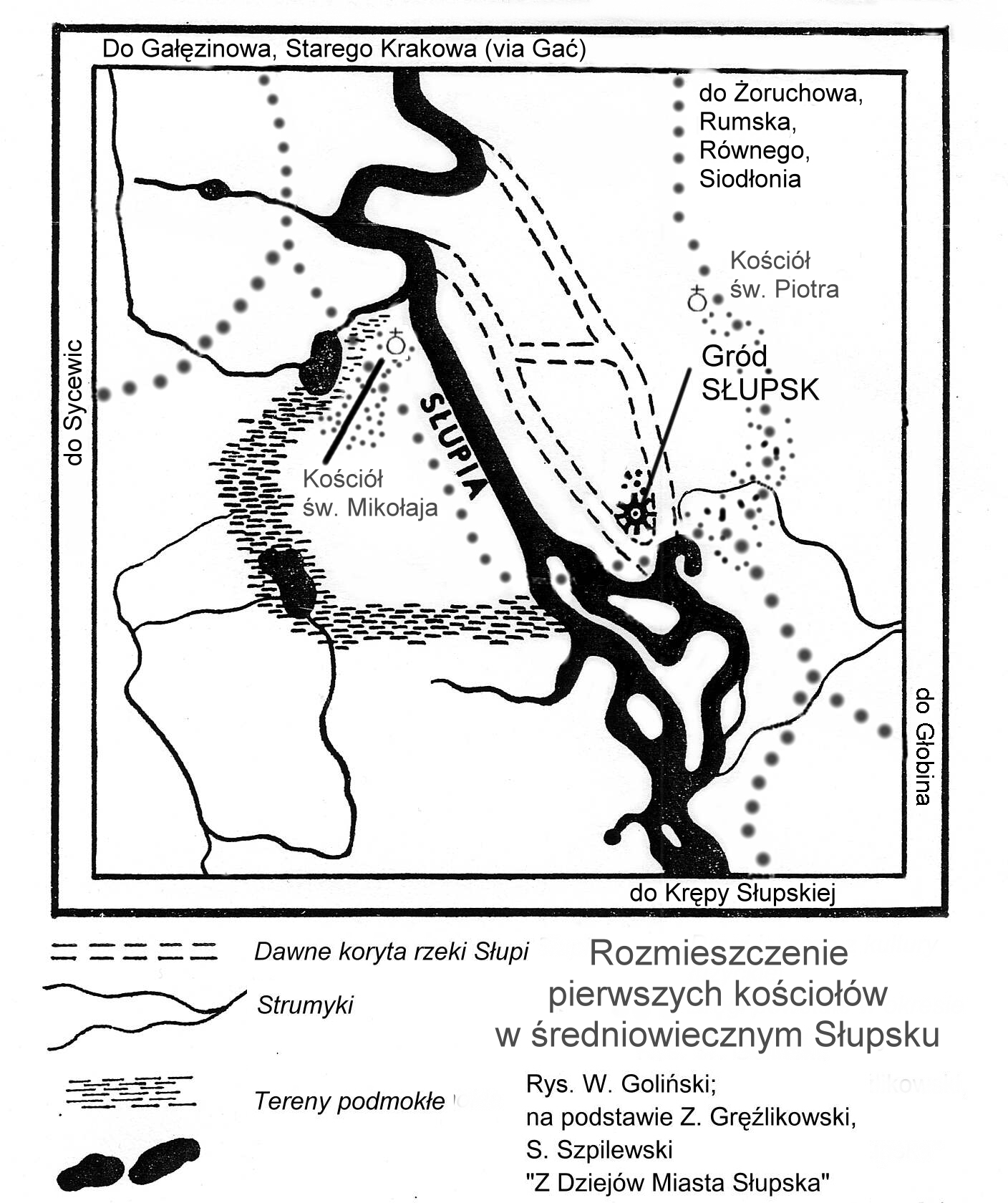 Rozmieszczenie pierwszych kościołów w Słupsku.